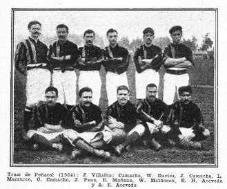 CURCC campeón en 1904